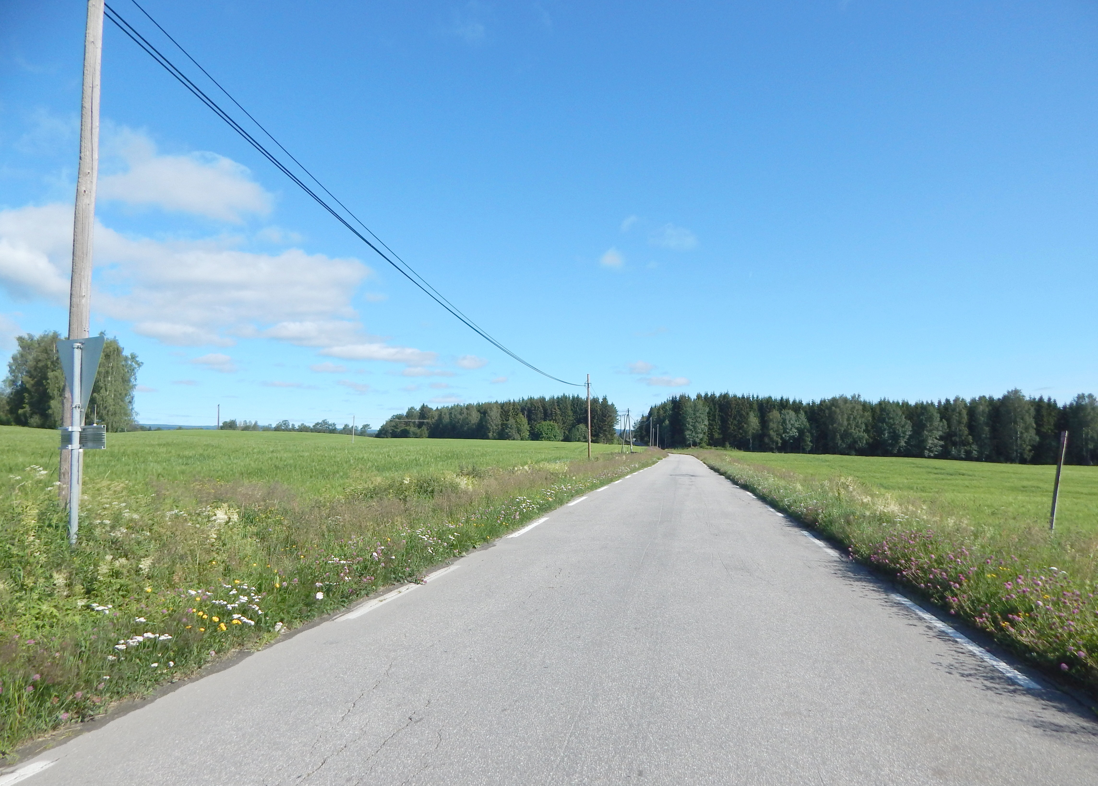 Brandsrudvegen i Løten